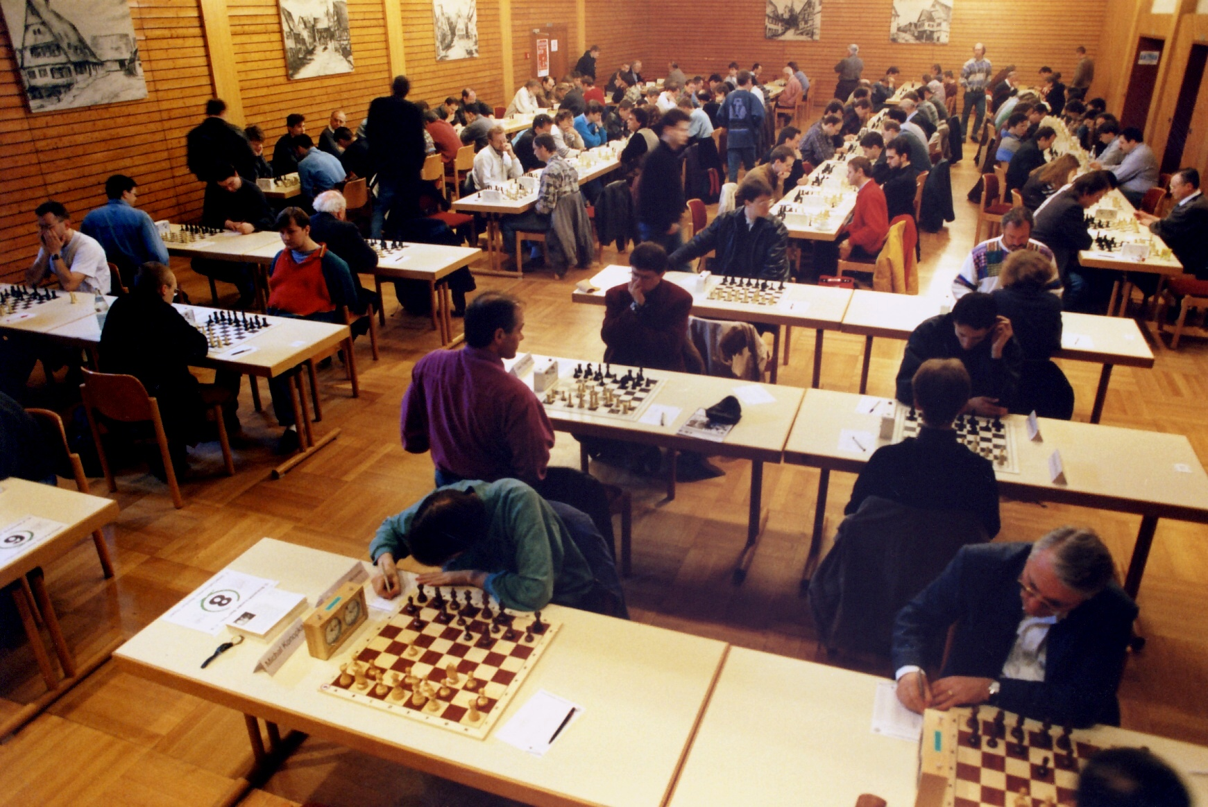 Chess Tournament: Neckar-Open in Deizisau (Germany)